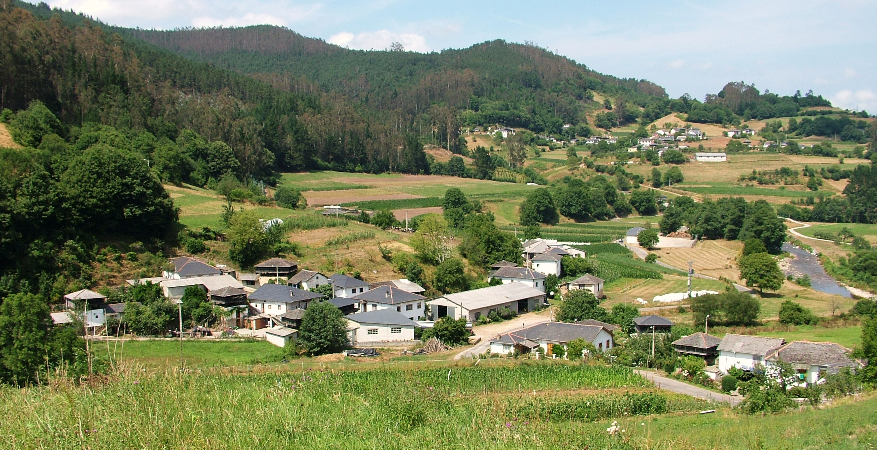 Vista del Valle de Paredes